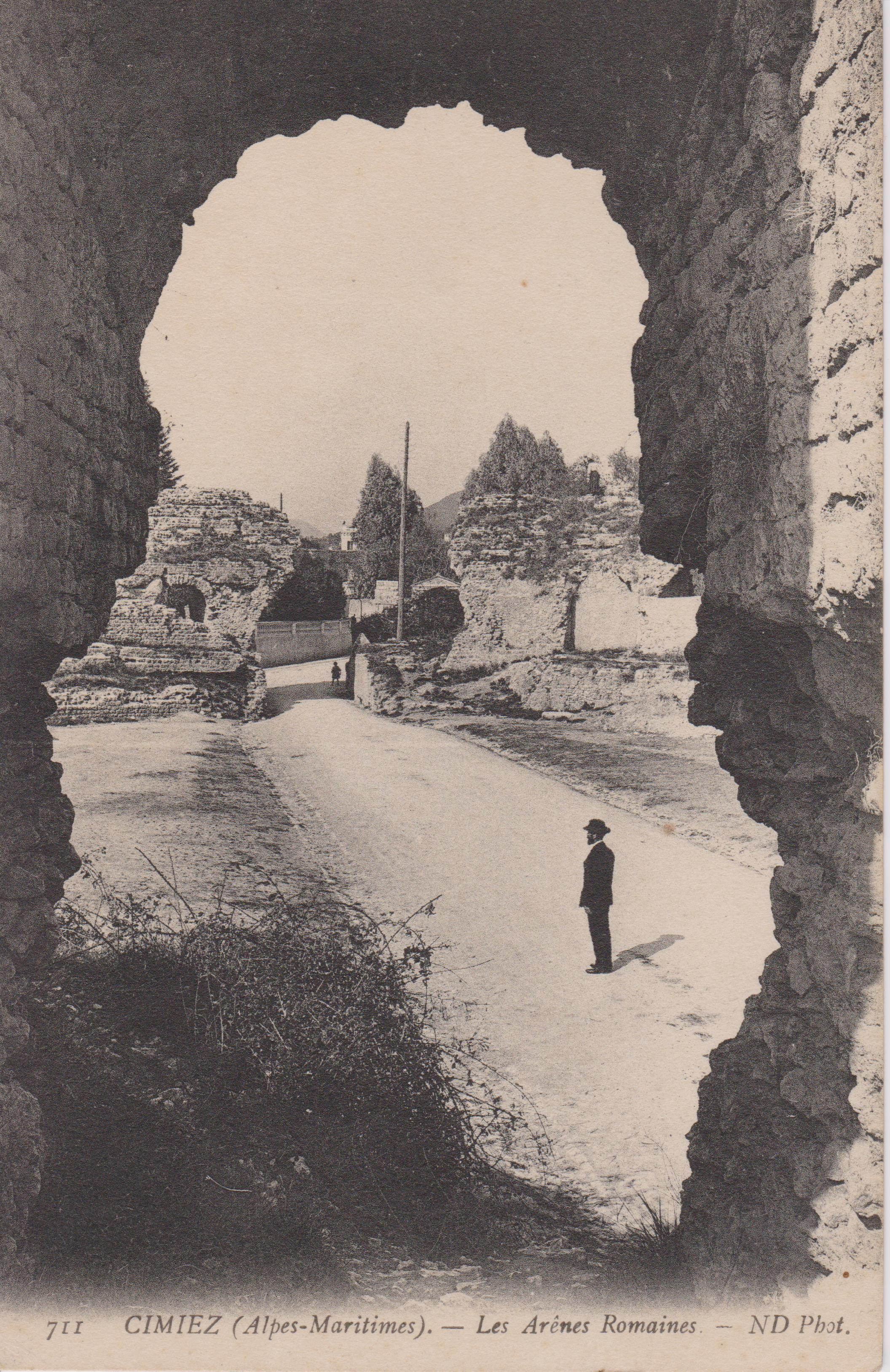 Les Arènes de Cimiez